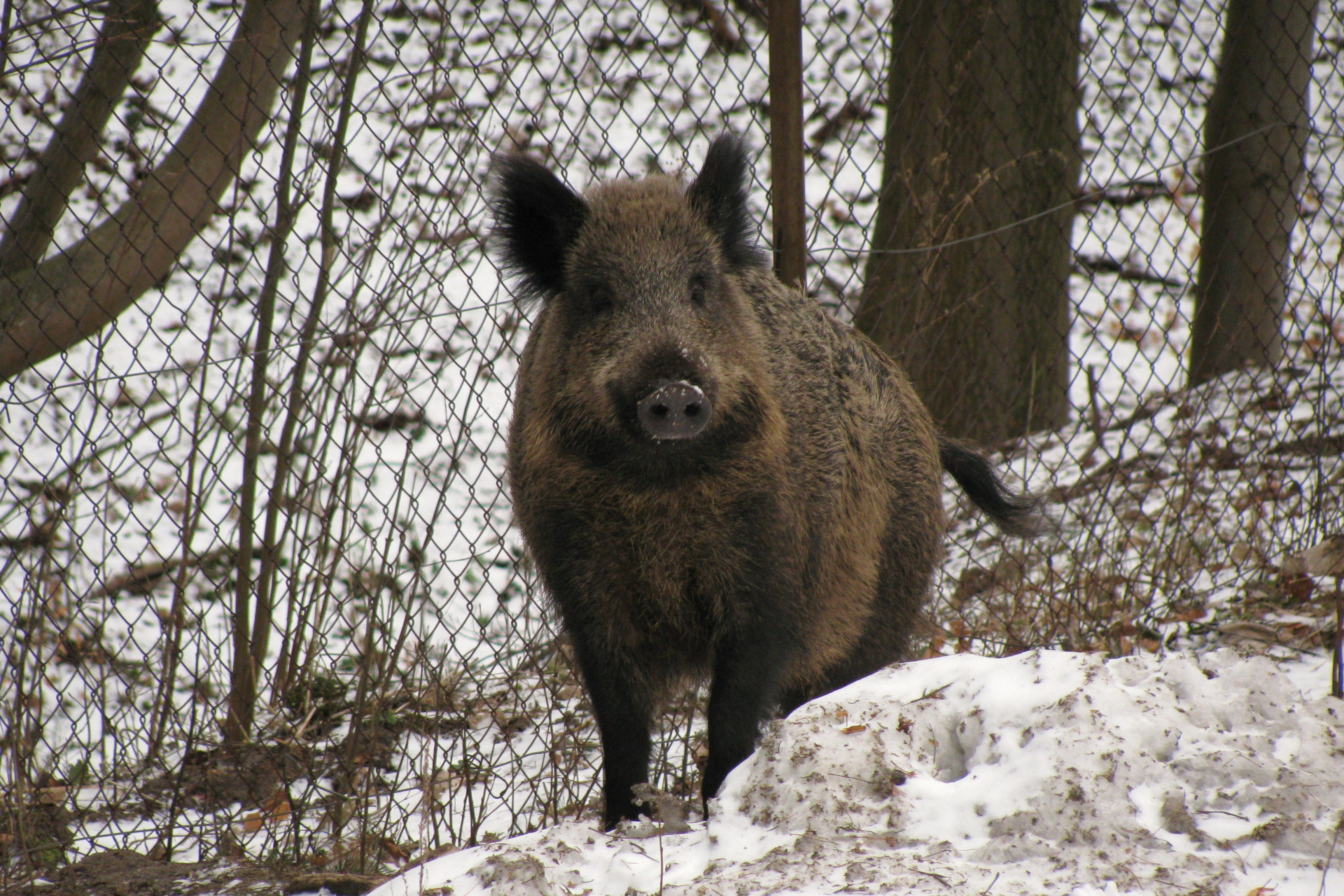 Dzik na skraju Lasów Oliwskich w Gdańsku Oliwie.